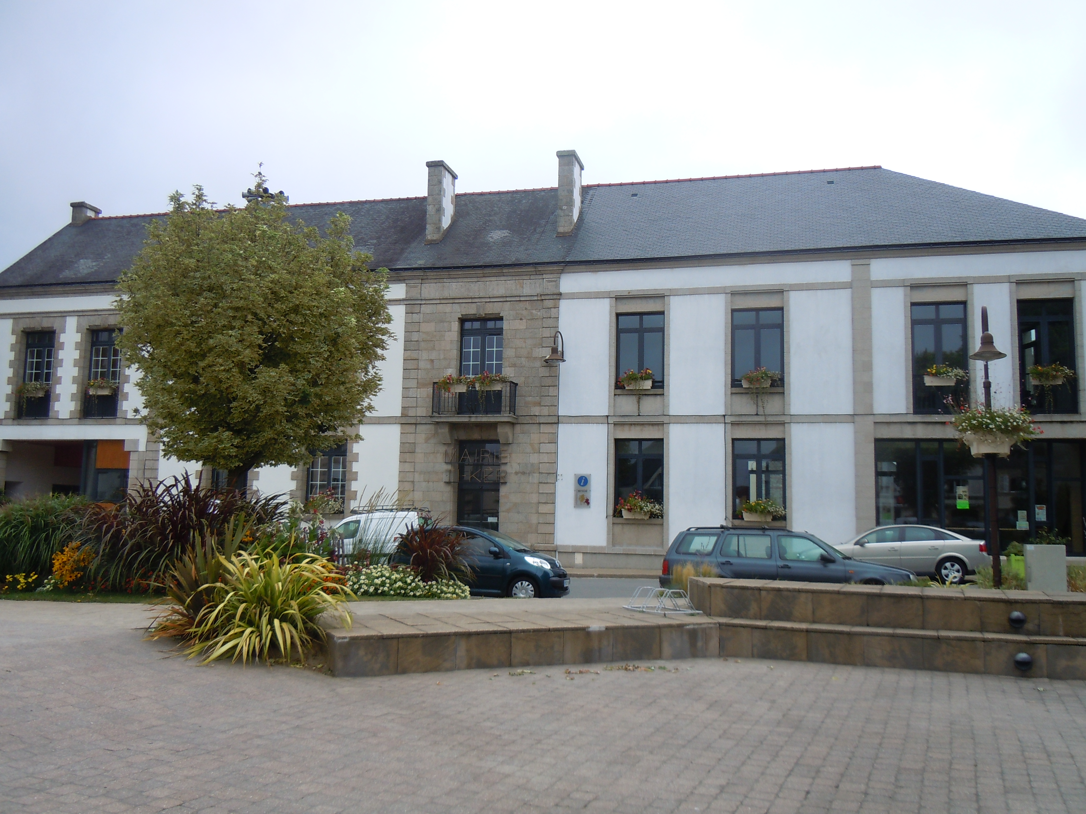 la mairie ( Ti-Ker ) de Cléguérec , département du Morbihan, région Bretagne